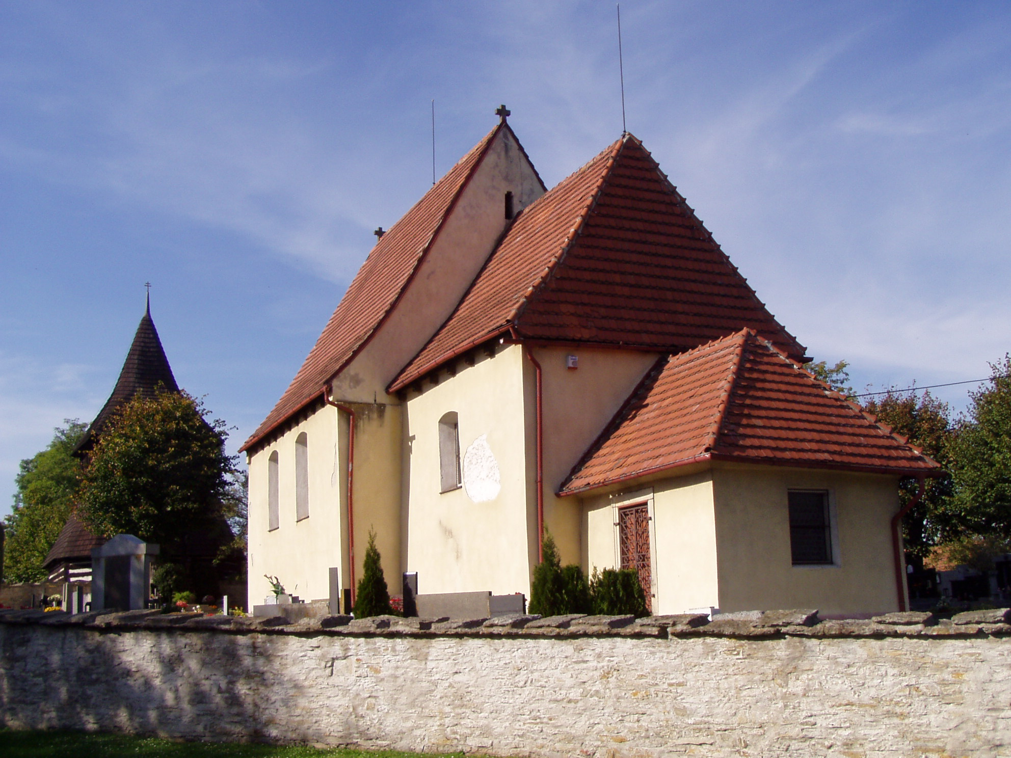 Kostel sv. Jana Křtitele v Rohenicích